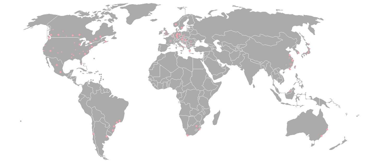 Cidades em que ocorreram concertos da Avril Lavigne.